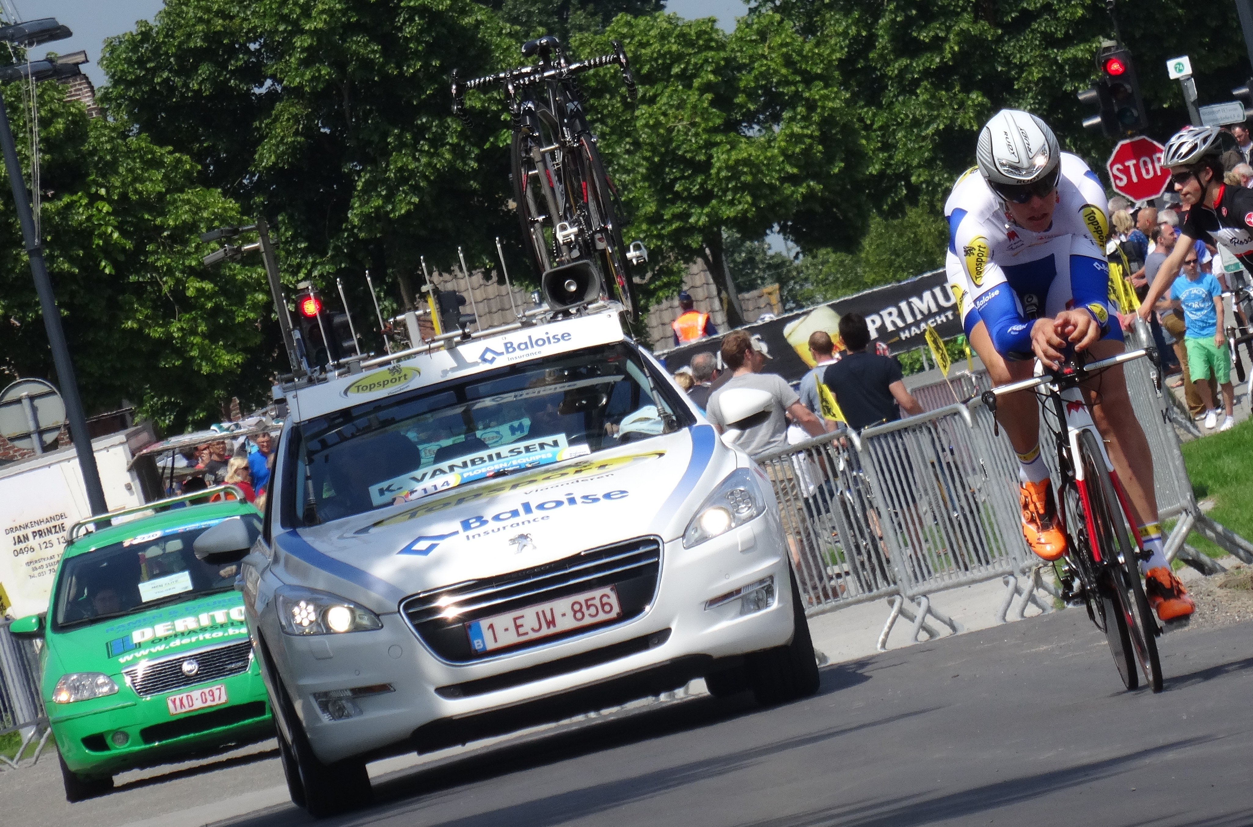 Reportage photographique réalisé le vendredi 30 mai à l'occasion du contre-la-montre individuel de la troisième étape du Tour de Belgique 2014 à Dixmude, Belgique.